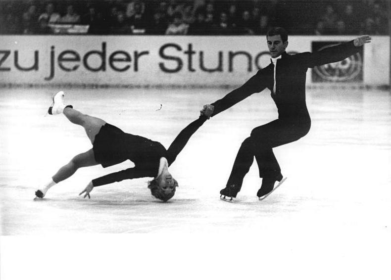 Heidemarie Walther, Hans-Ulrich Walther Zentralbild Thieme 11.10.69 Karl-Marx-Stadt: Internationales Schaulaufen zum Saisonauftakt im Eiskunstlauf am 10.10.69 in der Karl-marx-Städter Eissporthalle VIII. Parlament. Mit guten Leistungen wartete das Ehepaar Heidemarie und Hans-Ulrich Walter (SC Dynamo Berlin) auf.